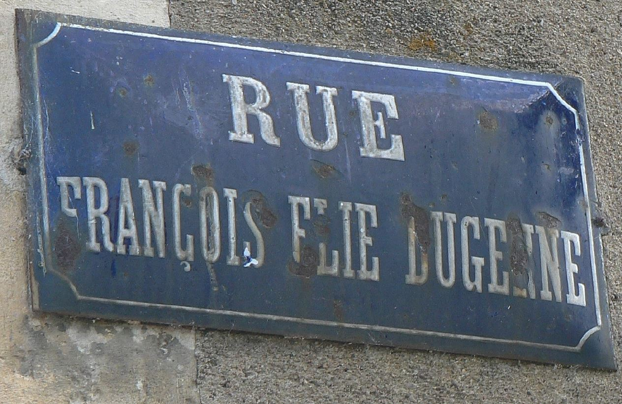 Rue Dugenne